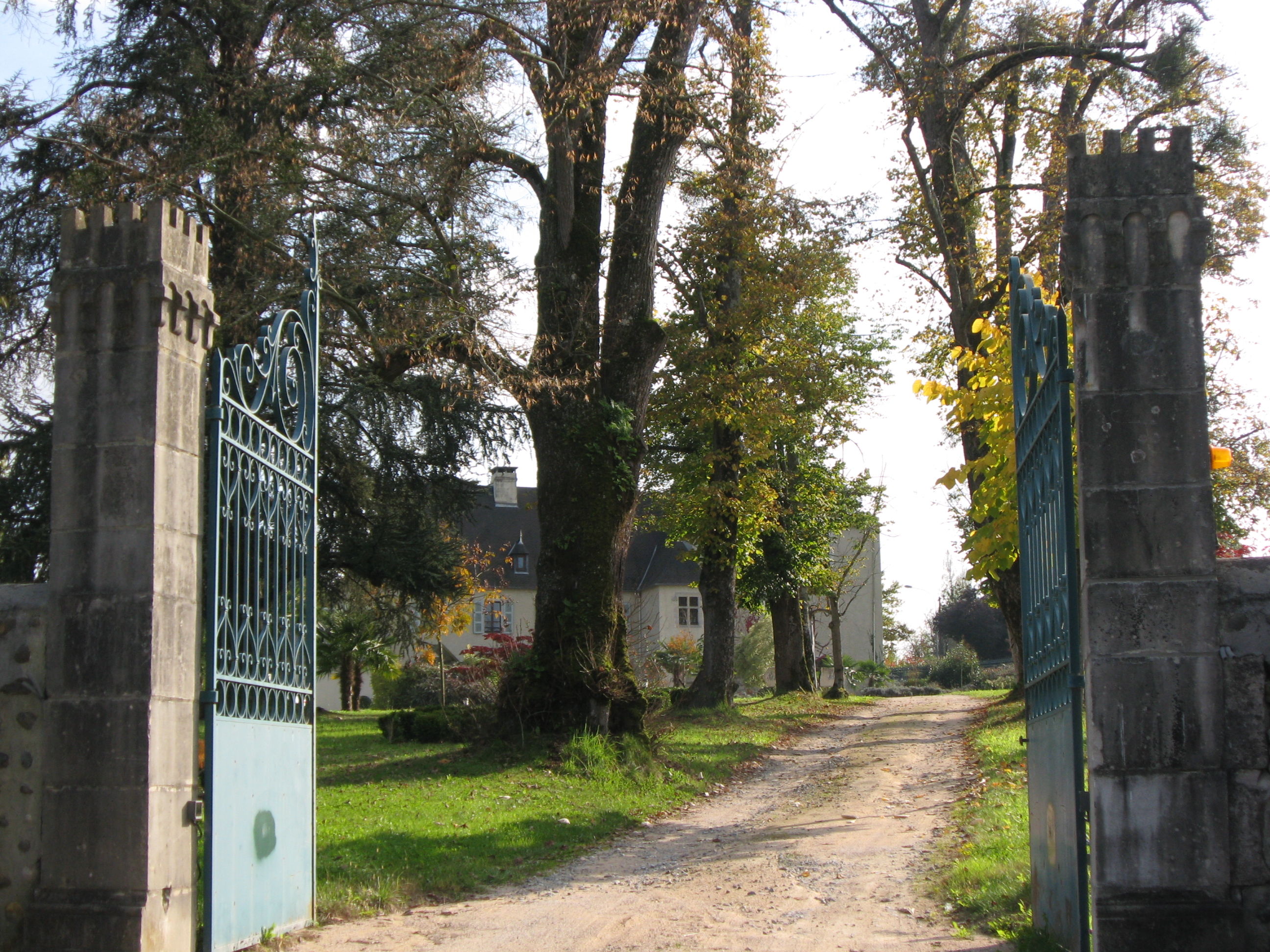 Vue de l'entrée du château Lamothe à Monein (Pyrénées Atlantiques) Pyrénées).